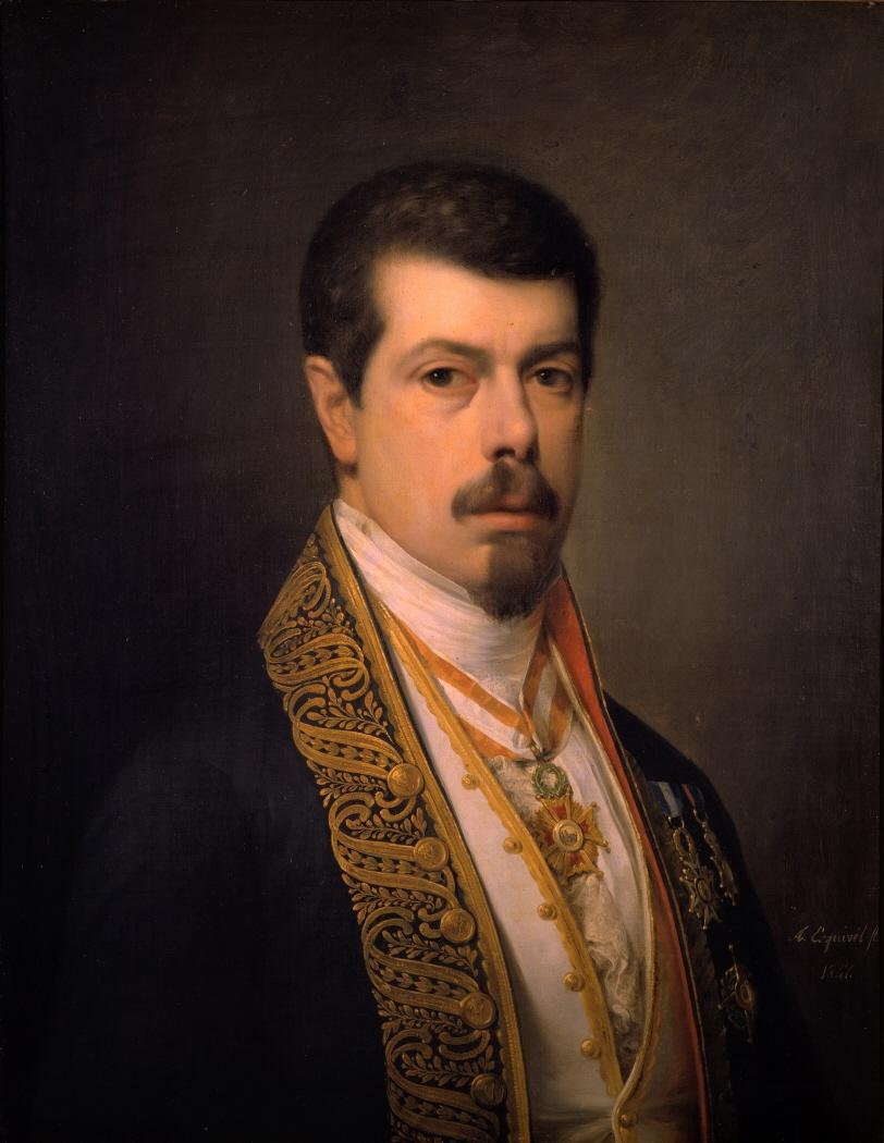 Autorretrato del pintor sevillano Antonio María Esquivel (1806-1857). Una copia de este autorretrato realizada por Joaquín Hernández de Tejada en el tercer cuarto del siglo XIX se conserva actualmente en el Museo de Bellas Artes de Córdoba.